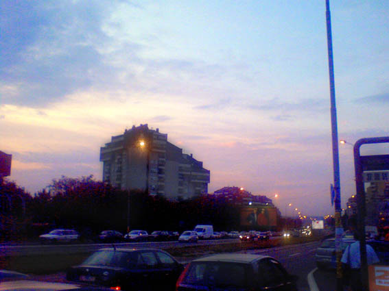 Žarkovo